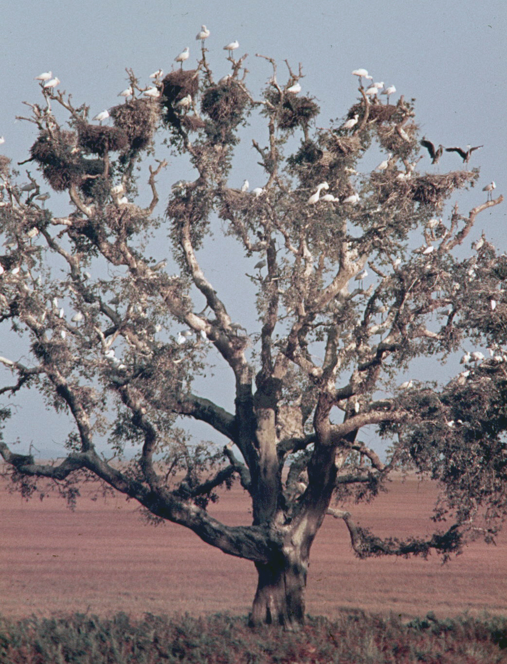 Alcornoque (Quercus suber) llamado La Pajarera con nidos de garcetas (Egretta garzetta) y espátulas (Platalea leucorodia). Estación Biológica de Doñana, Huelva.